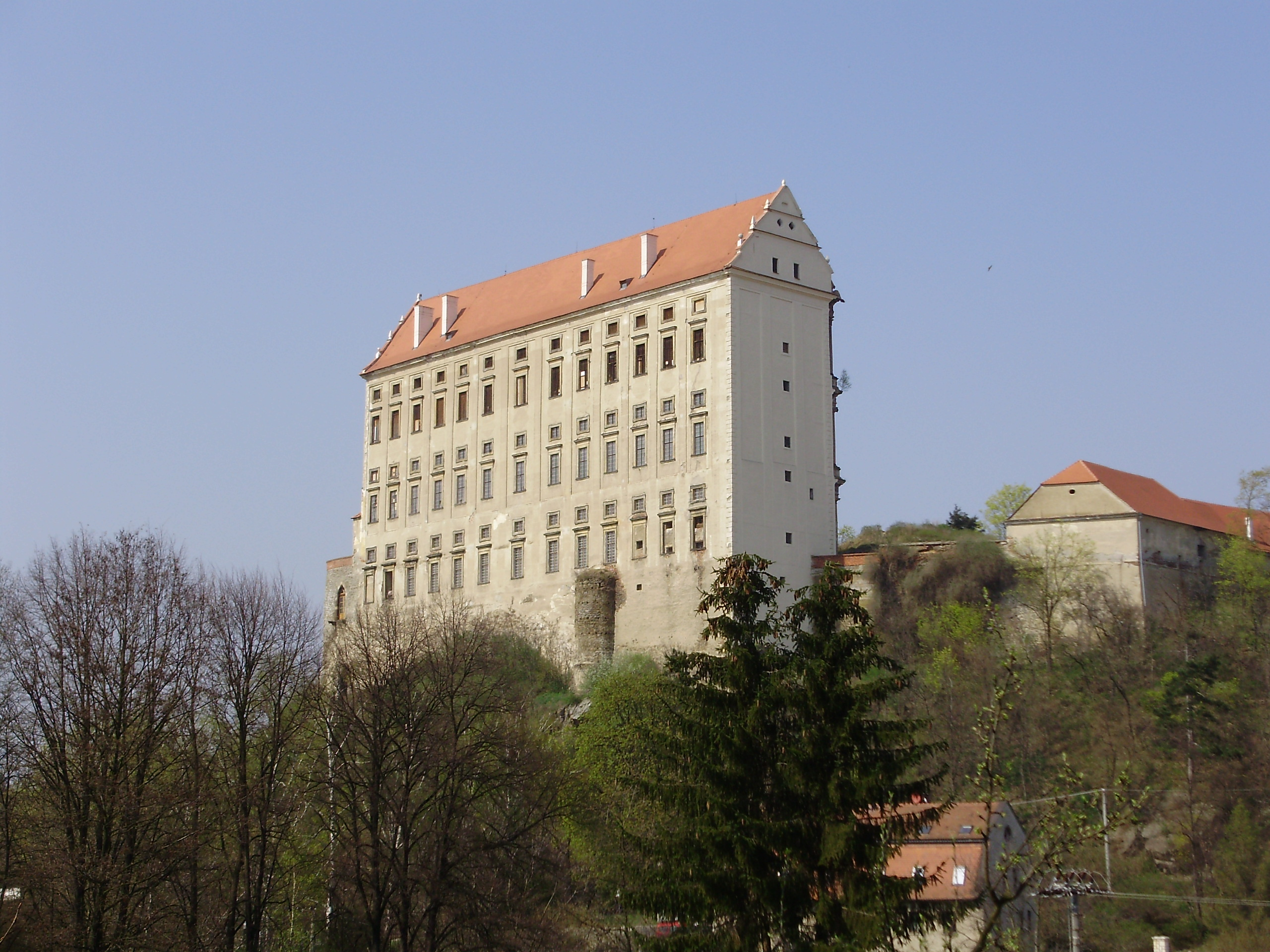 Plumlov zámek.